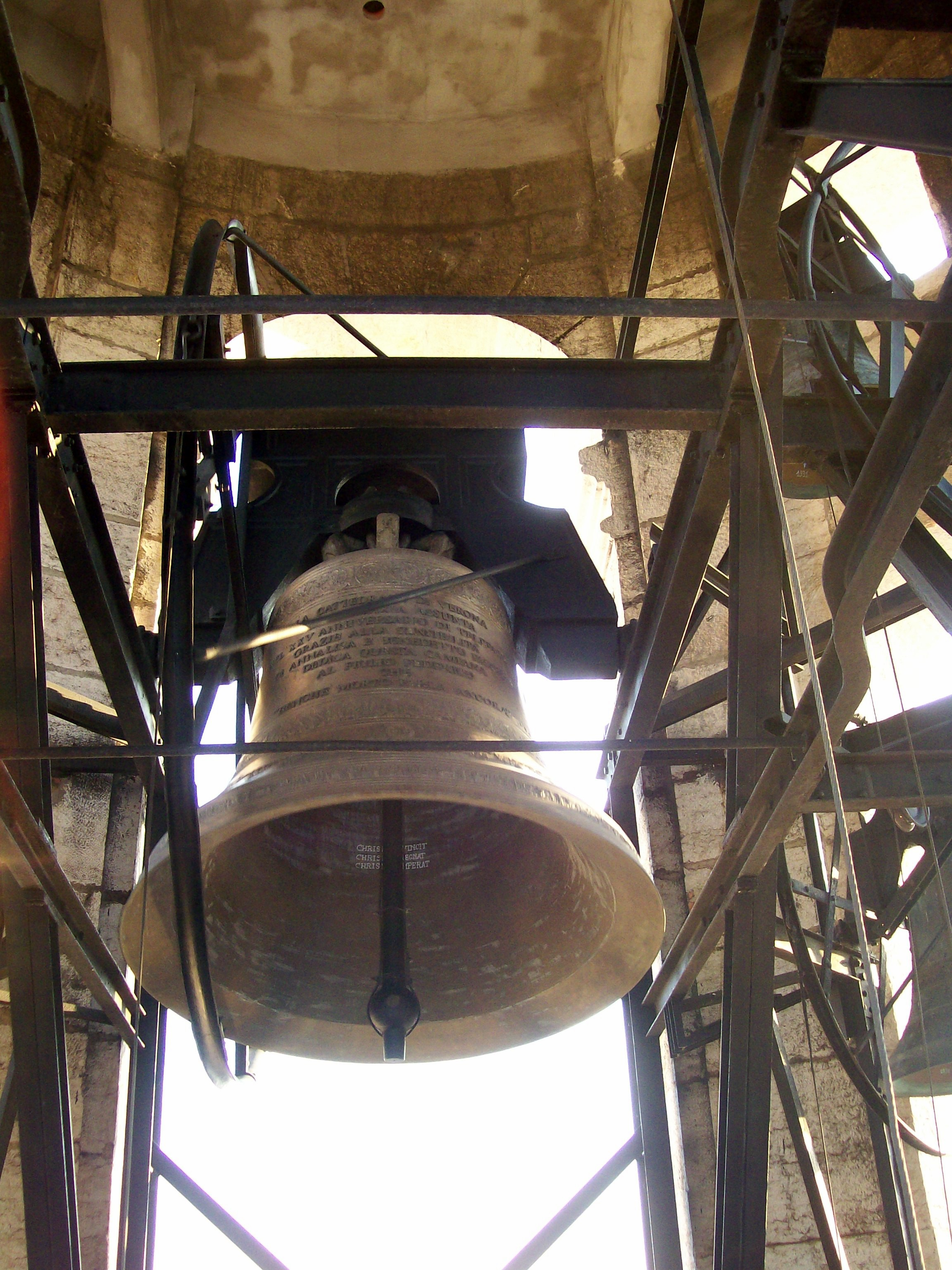 Campana maggiore LA2 del concerto a nove campane (Sistema Veronese) della Cattedrale di Verona. Fusa nel 2003 dalla fonderia De Poli di Vittorio Veneto (TV), pesa 4566 Kg. Maggiore campana al mondo a rotazione completa manuale di 360°.